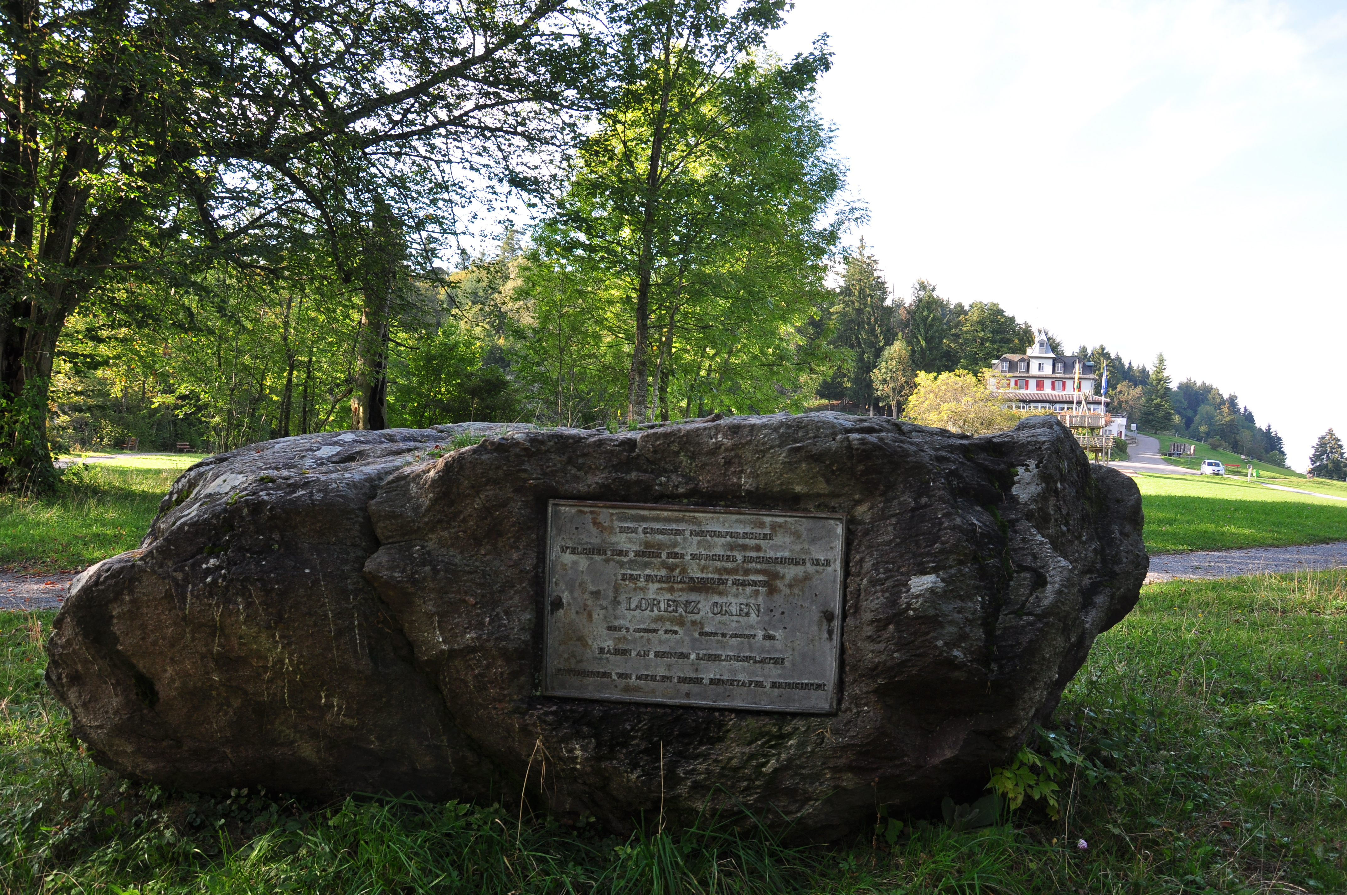 Pfannenstiel Okenshöhe (Switzerland)